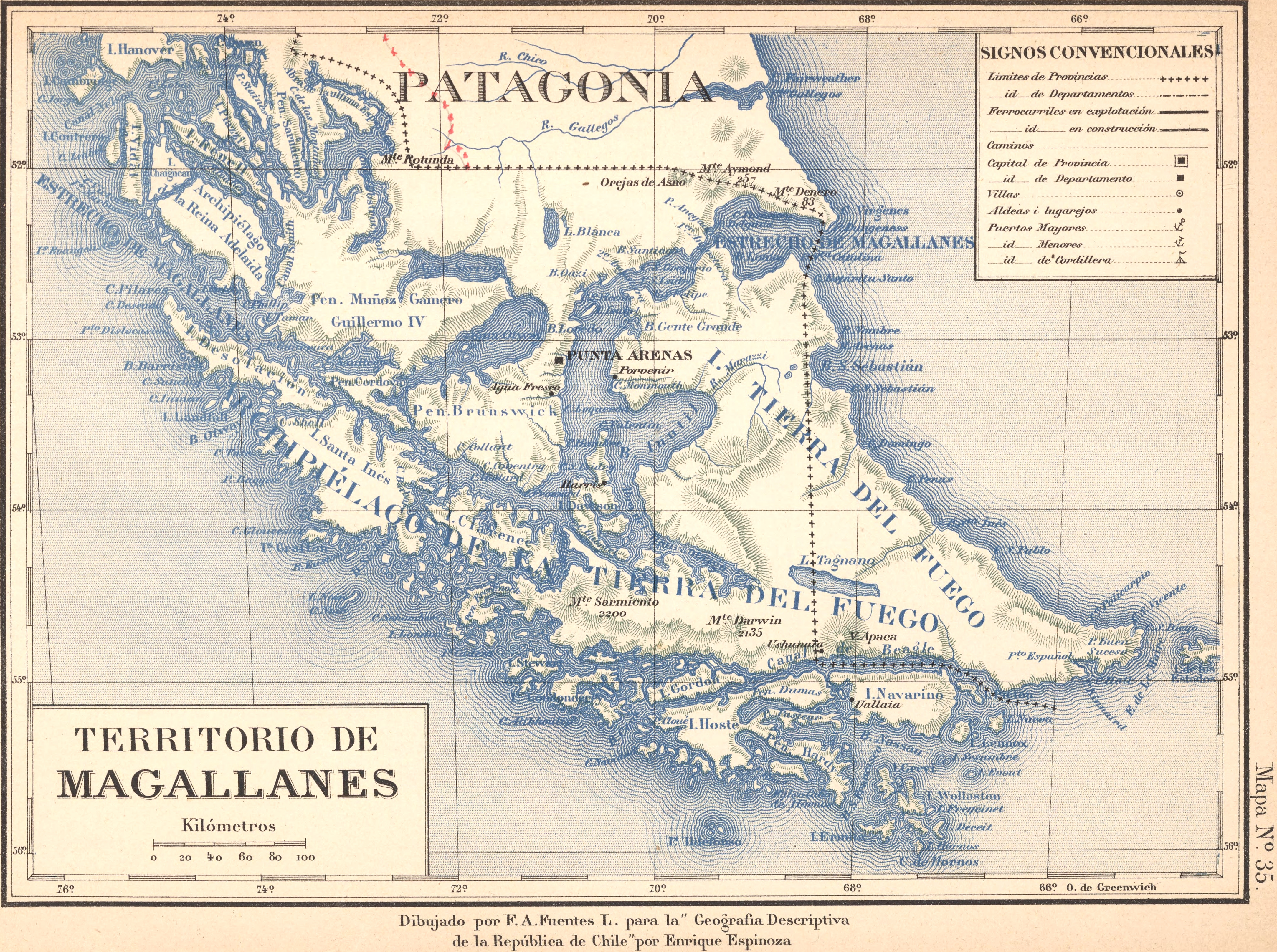 Mapa del Territorio de Magallanes (1853 - 1929), antecesor de parte de la Región de Aysén y Toda la Región de Magallanes y Antártica Chilena.